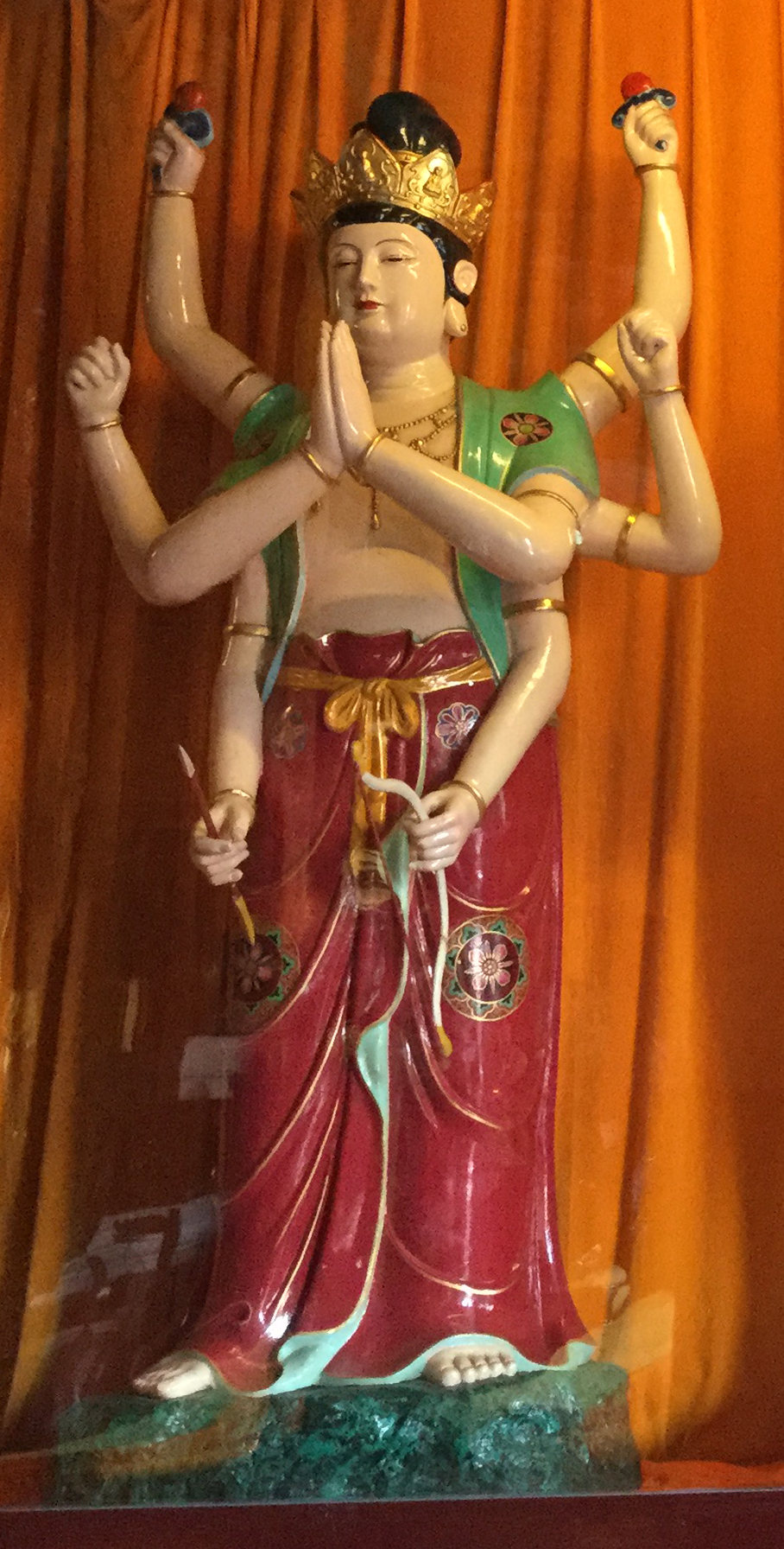 中文（中国大陆）: 散脂大将，位于汕头天坛花园九天禅院。